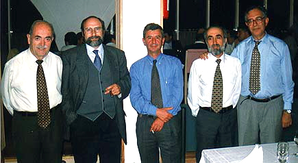 Presidentes de la Sociedad Española de Paleontología (SEP) hasta 1997. De izquierda a derecha, Jaime Truyols Santonja, Antonio Goy Goy, Luis Sánchez de Posada, Antonio Perejón Rincón y Leandro Sequeiros San Román. Octubre de 1997.